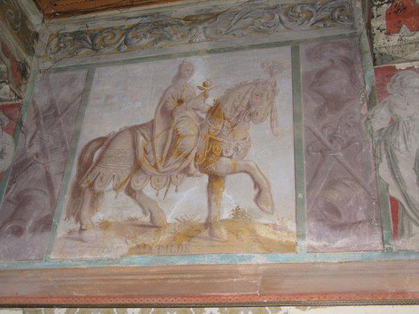 affresco raffigurante matilde a cavallo in palazzo ex Rossi, ora Benatti, secentesco in Bondeno di Gonzaga. Il palazzo si ritiene costruito su preesistente villa matildica, Bondeno di Roncore' ove matilde morì.